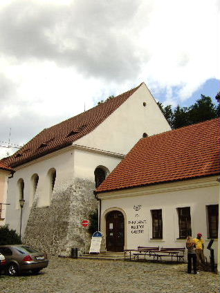 Třebíč: Synagoge (2009)